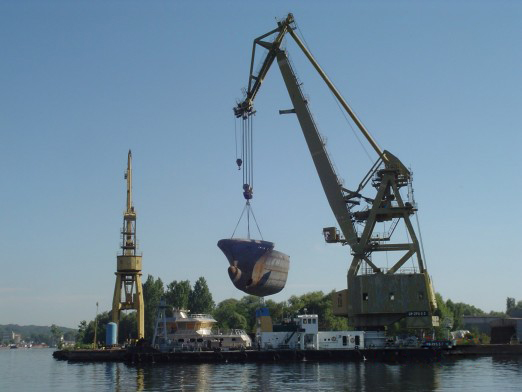 Szczecin, DP-ZPS-Ś-3 "GUCIO" podczas pracy